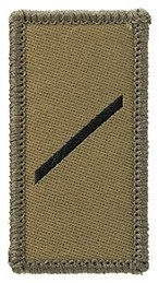 Soldat